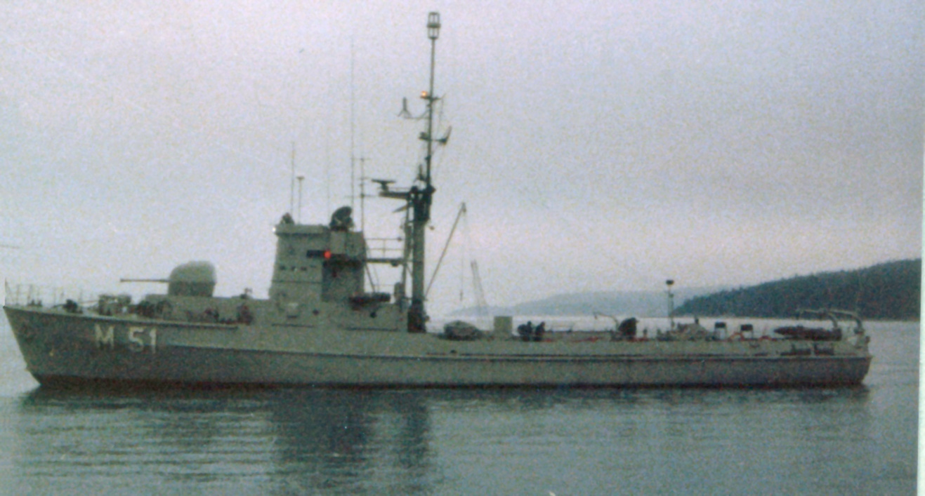 The Swedish minesweeper HMS Hanö 1977.